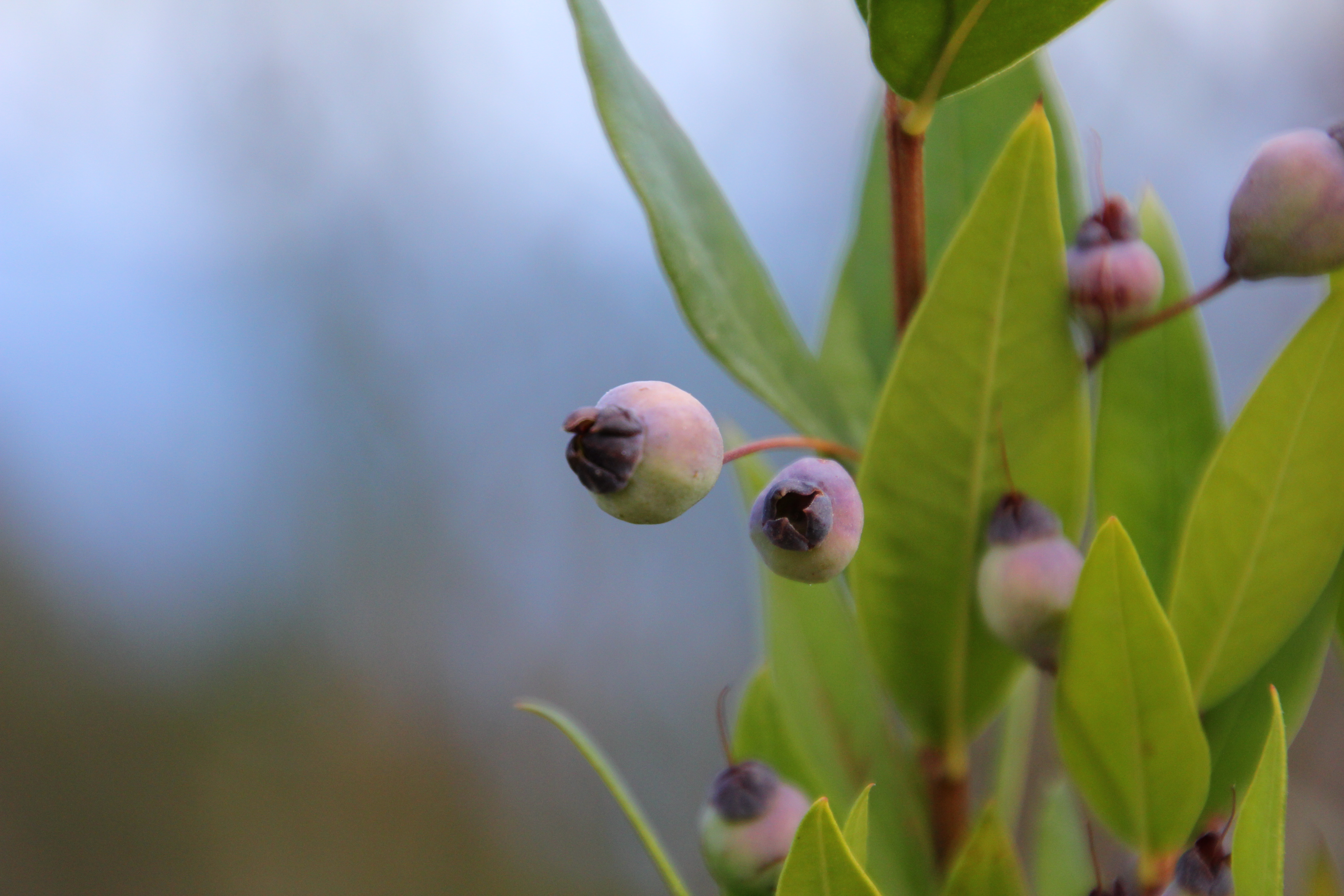 Flora della Sardegna